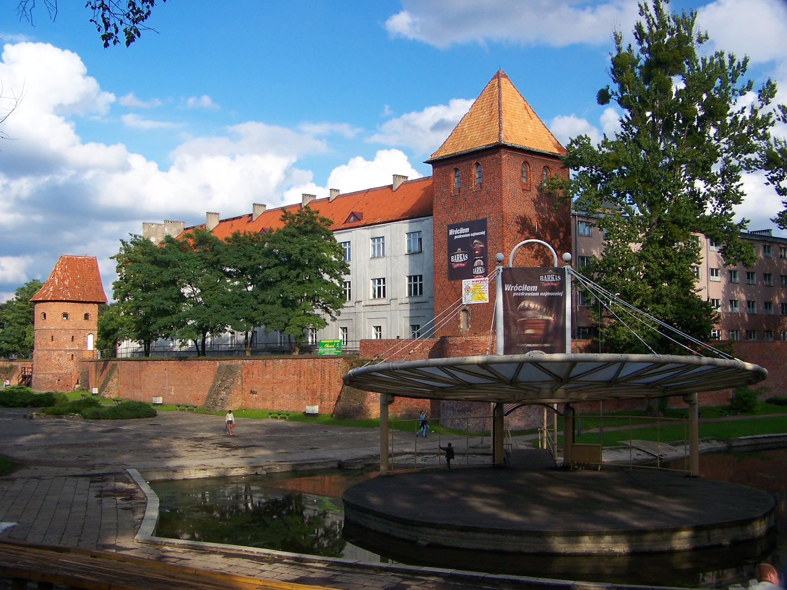 Miejskie mury obronne w Braniewie.